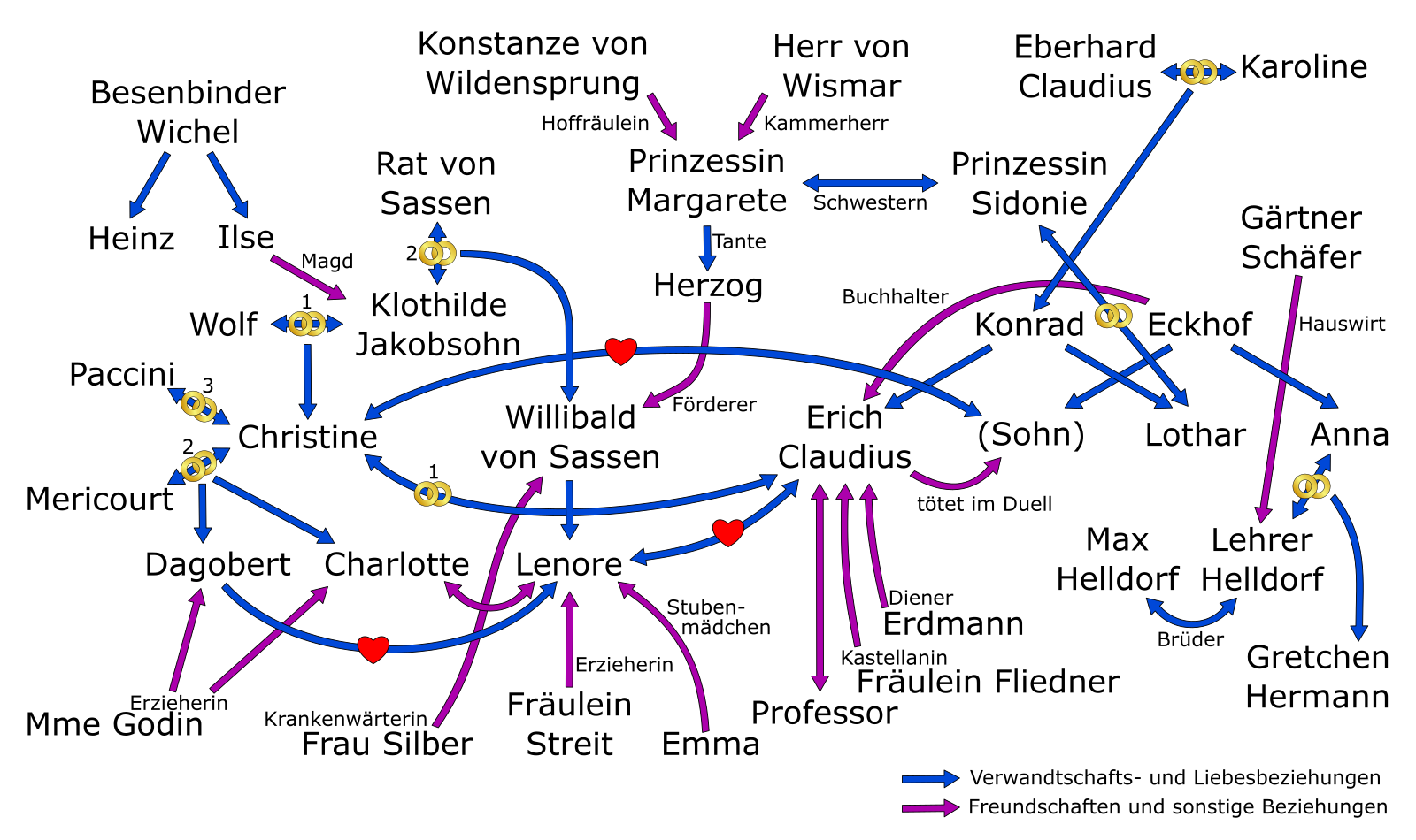 Figurenübersicht, E. Marlitts Roman Das Haideprinzeßchen